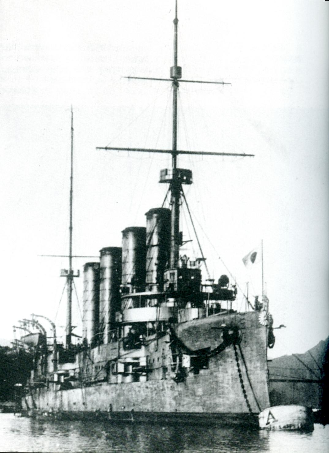 IJN Aso at Maizuru